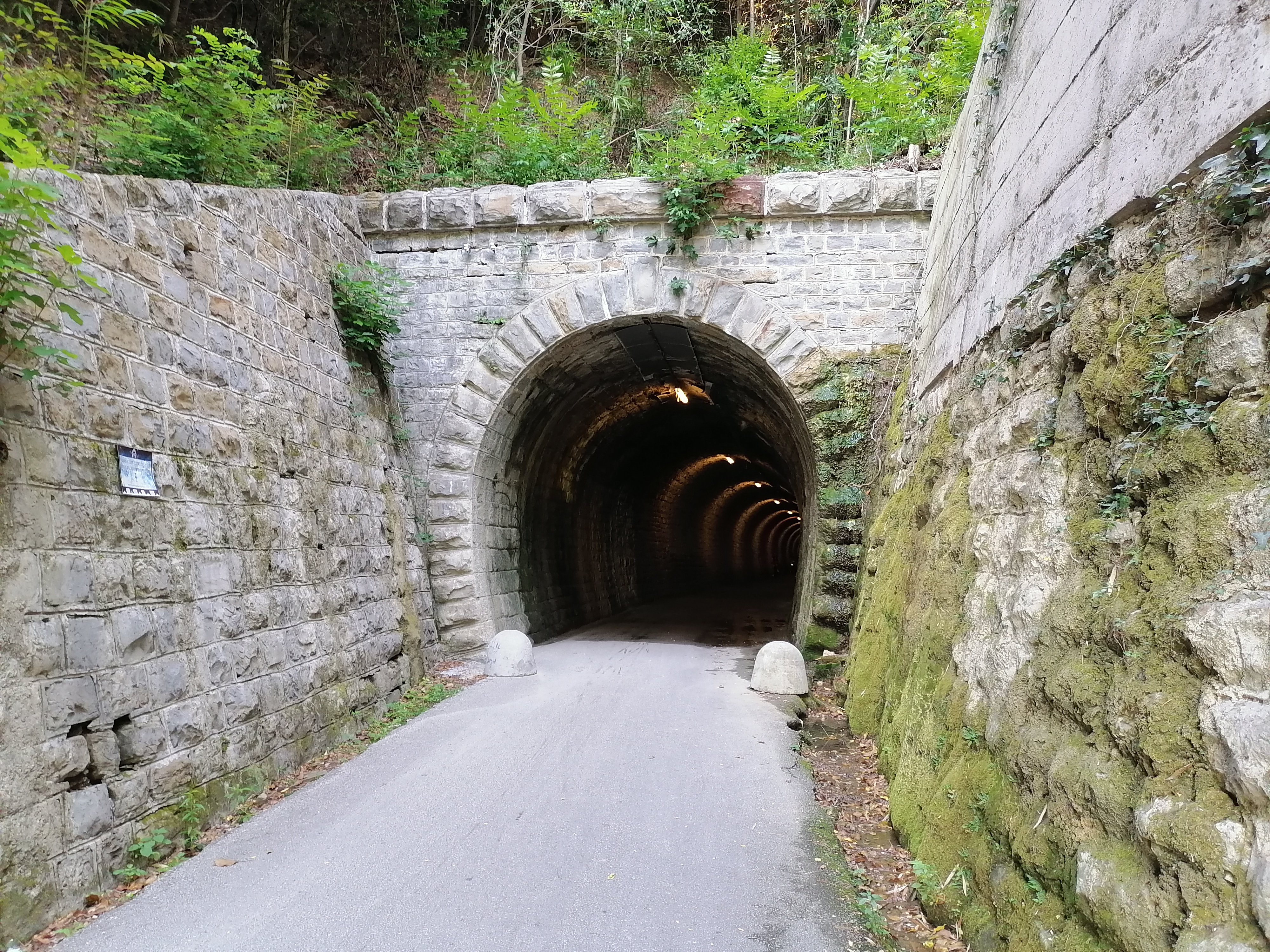 Predor Valeta na Parenzani